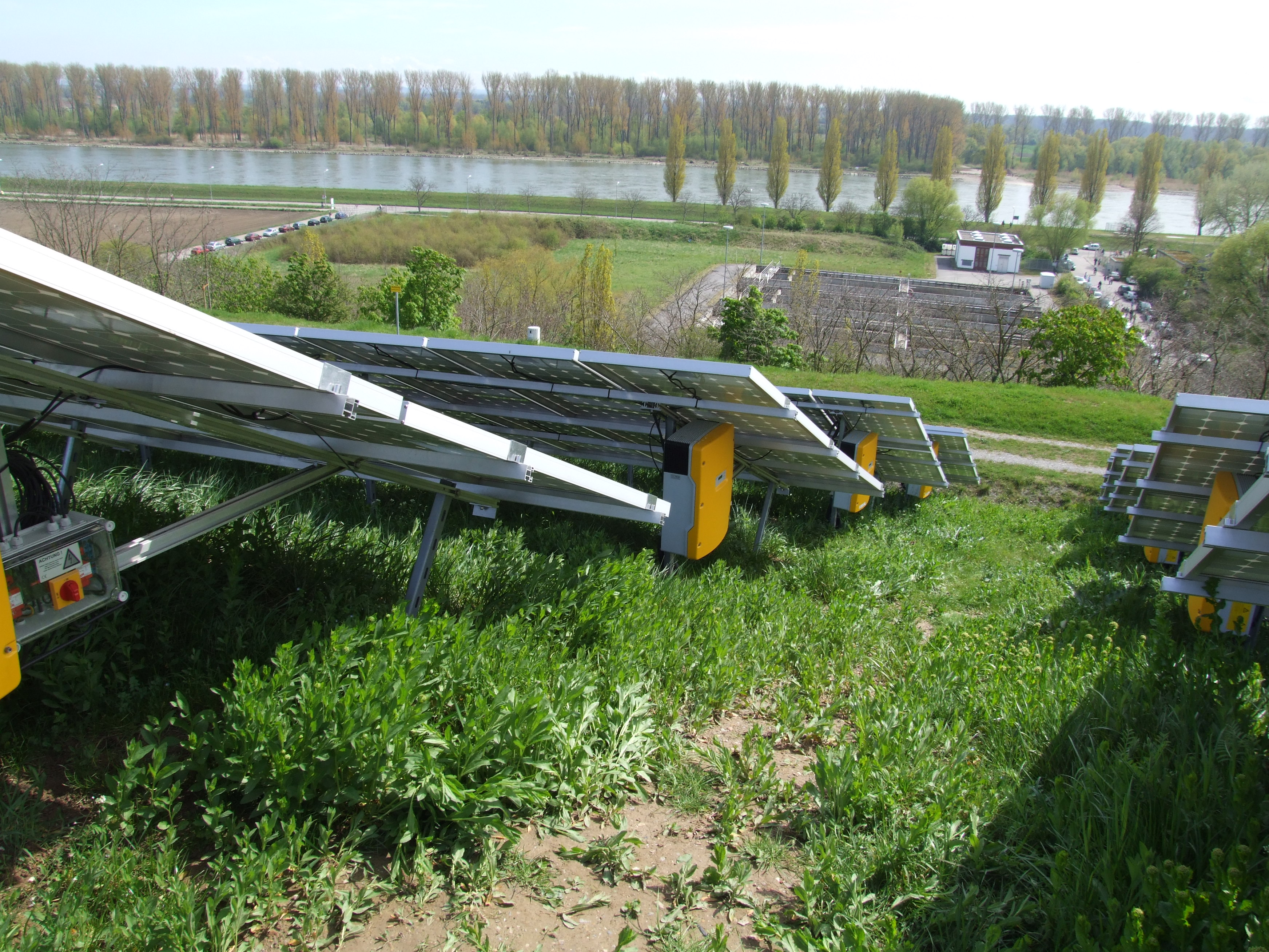 Müllberg Speyer: Solaranlage auf den Osthang; hier Blick auf Wechselrichter von SMA Solar montiert hinter den BP-Solarpanelen; unten die Kläranlage Speyer und der Rhein gesäumt von großen Pappeln